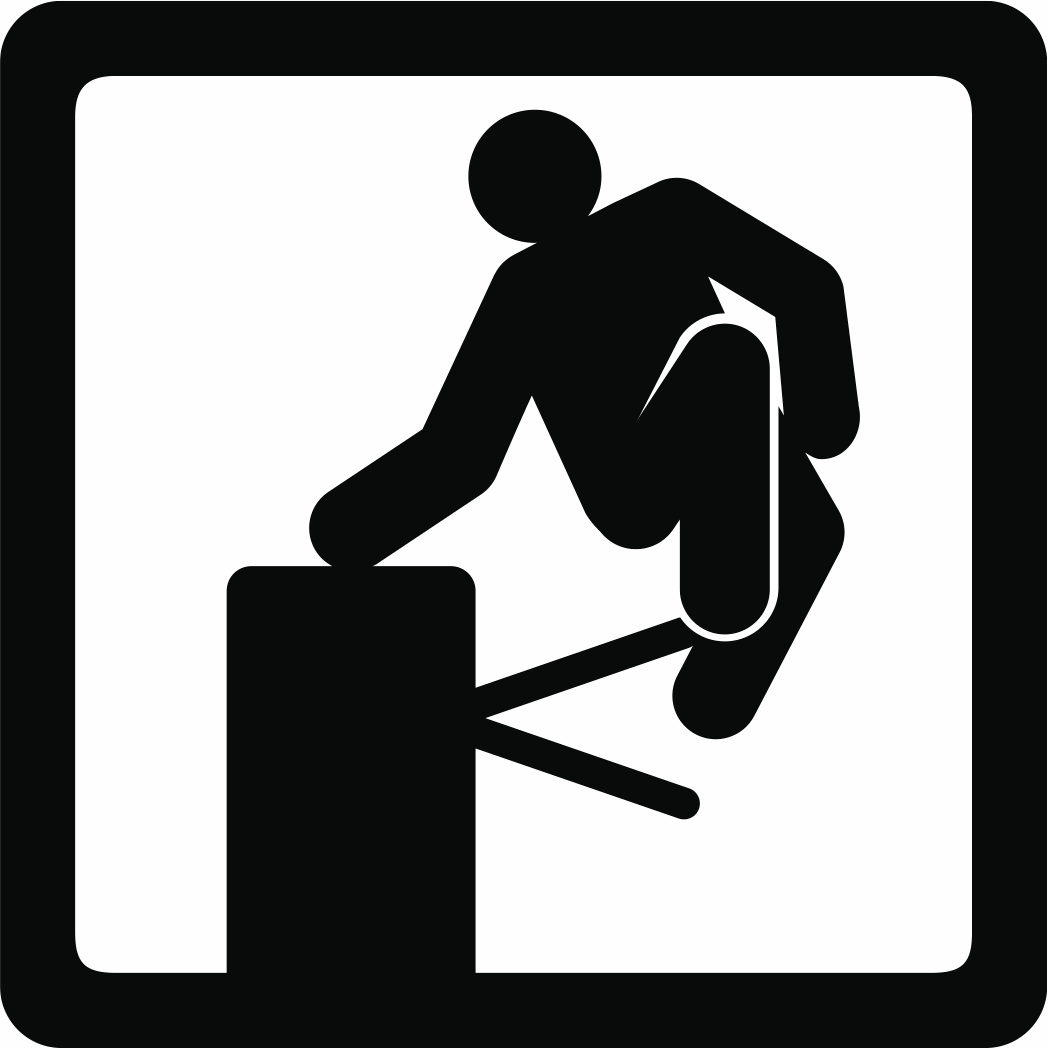 Planka.nu:s logga